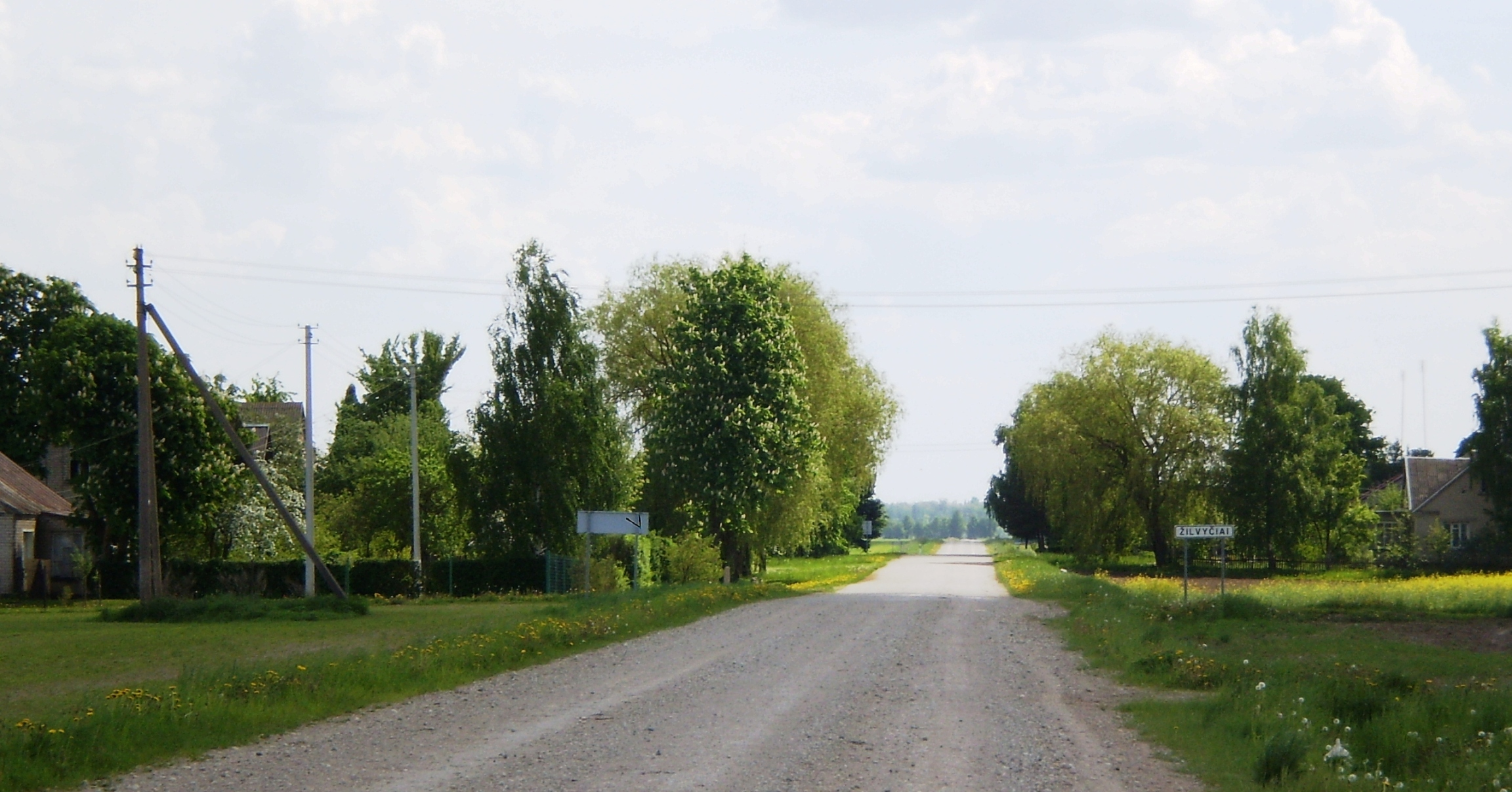 Žilvičiai, Kėdainių raj.